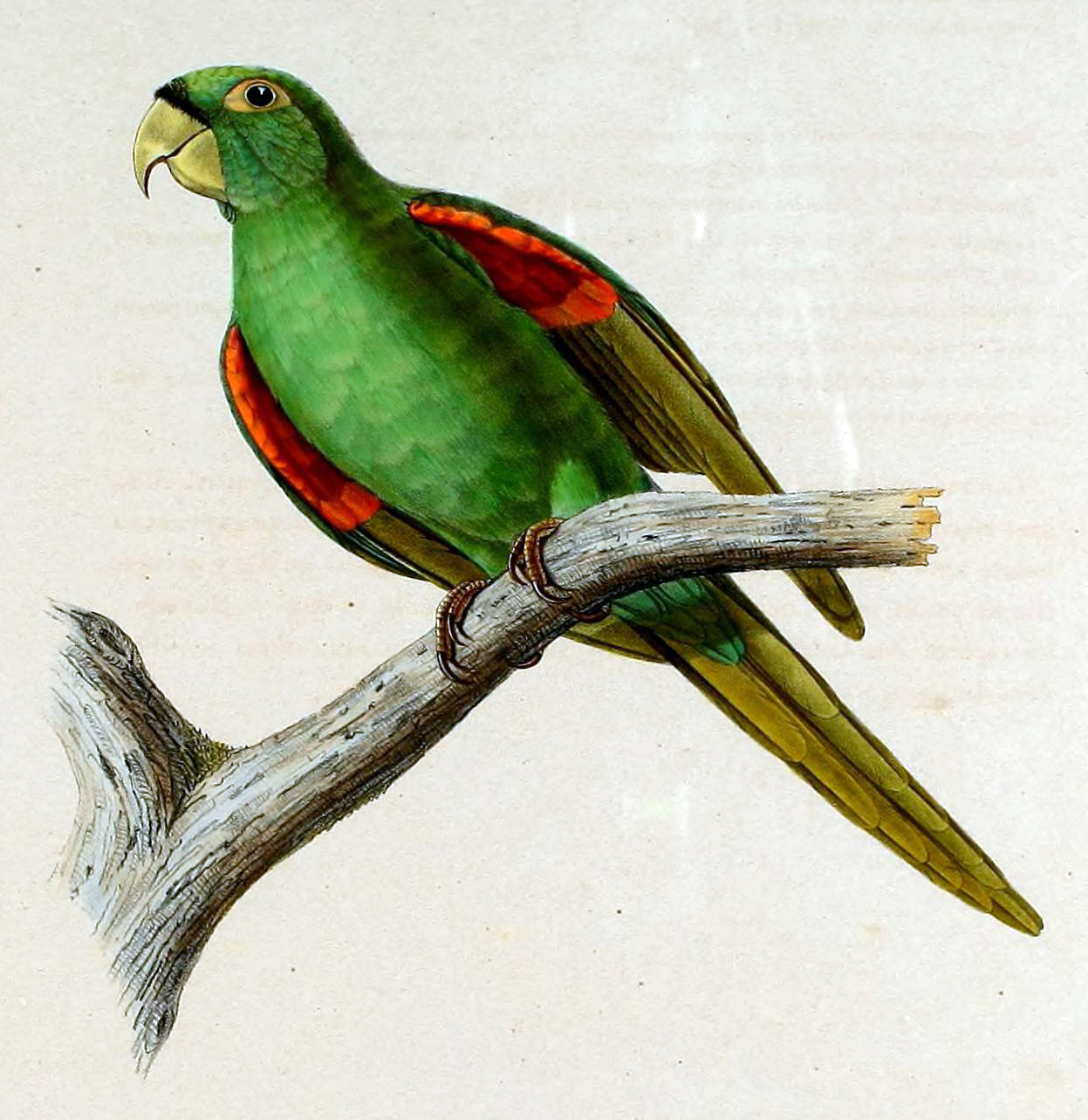 Plate VIII: Evopsitta maugei. Illustrations from Iconographie des perroquets non figurs dans les publications de Levaillante et de M. Bourjot Evopsitta maugei = Aratinga chloroptera maugei == Psittacara chloropterus maugei